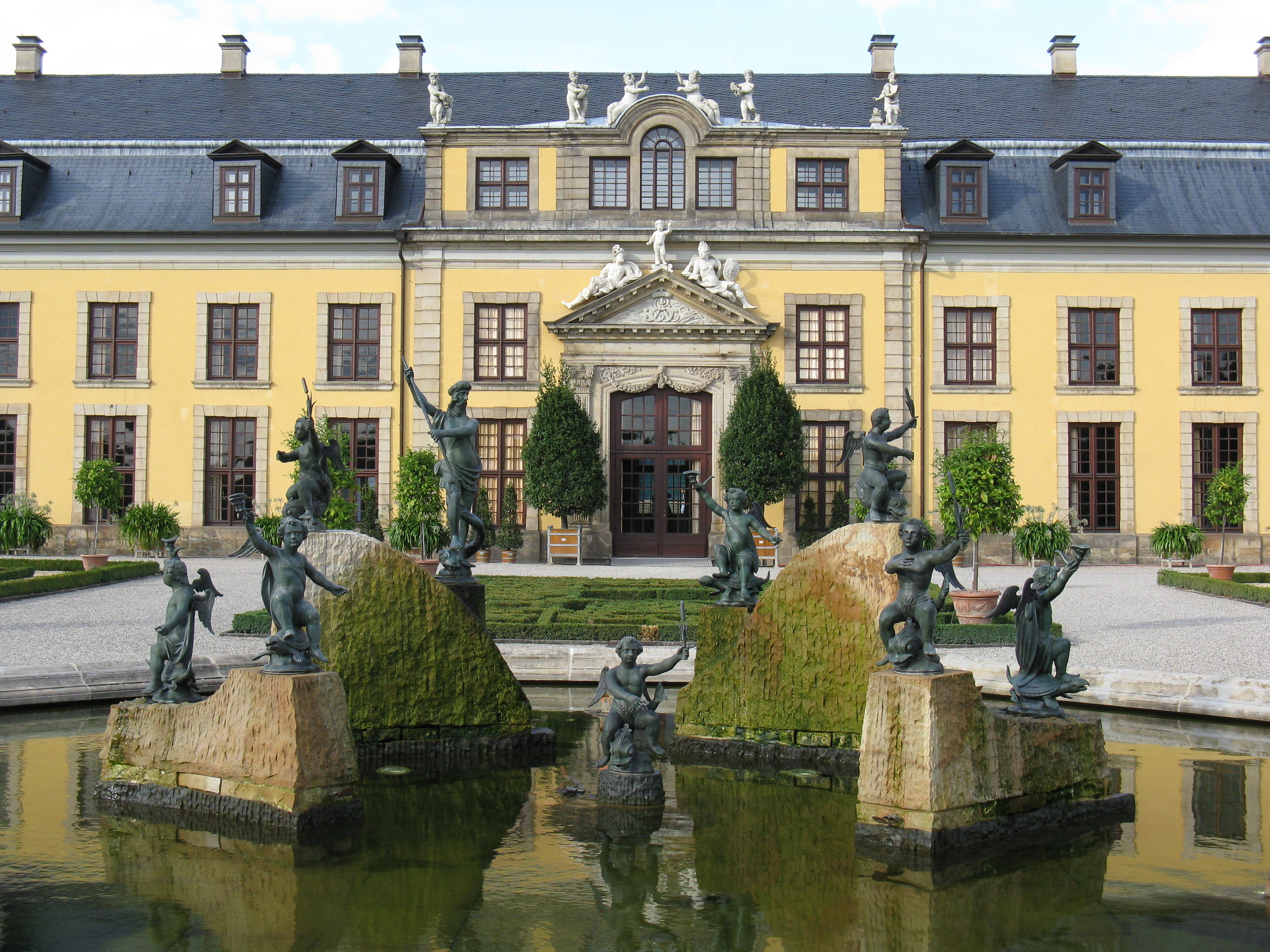 Großer Garten in Hannover-Herrenhausen: Brunnen vor dem Galeriegebäude